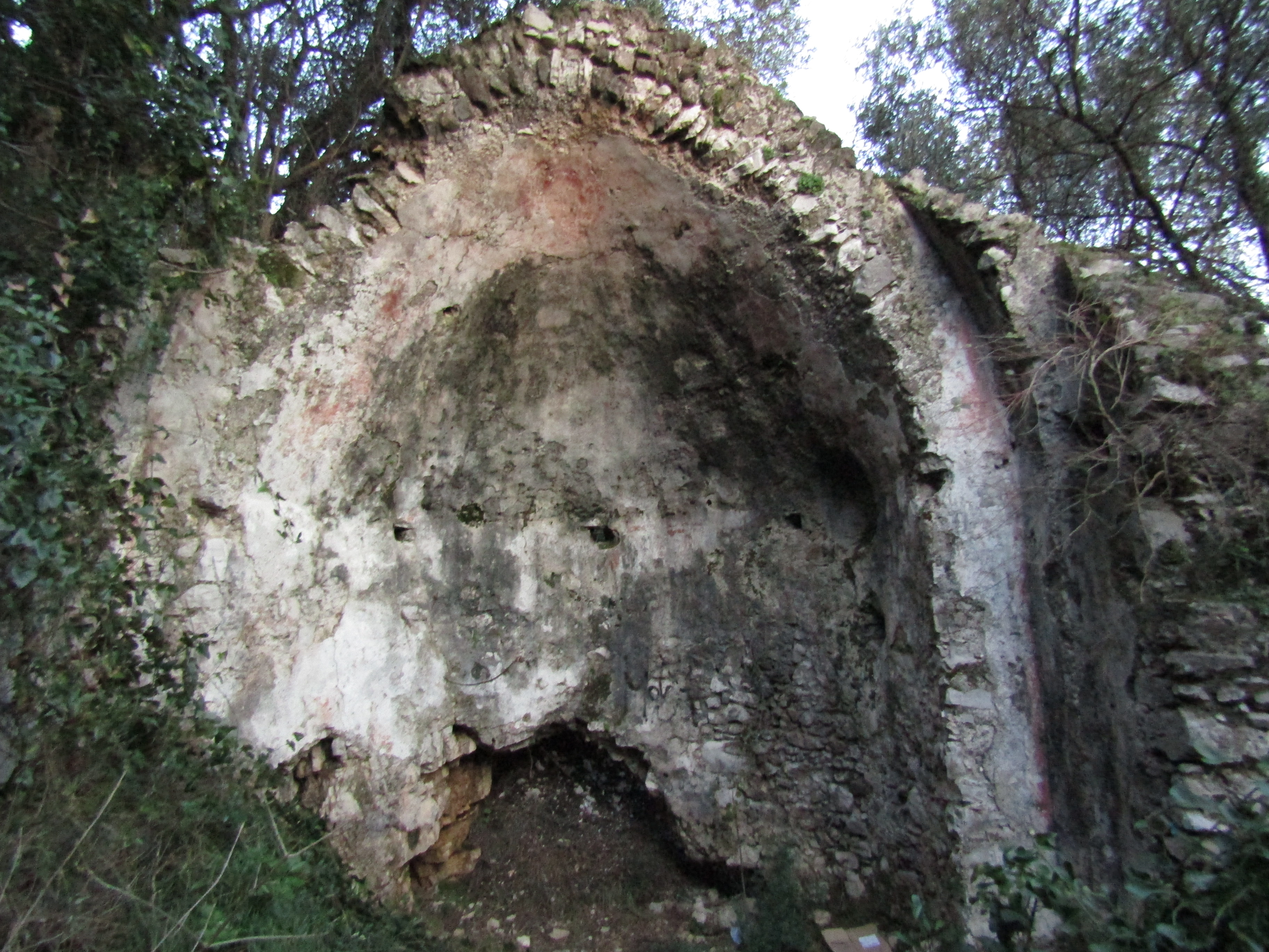 Abside della Chiesa medievale di Santa Margherita, Nocera Inferiore